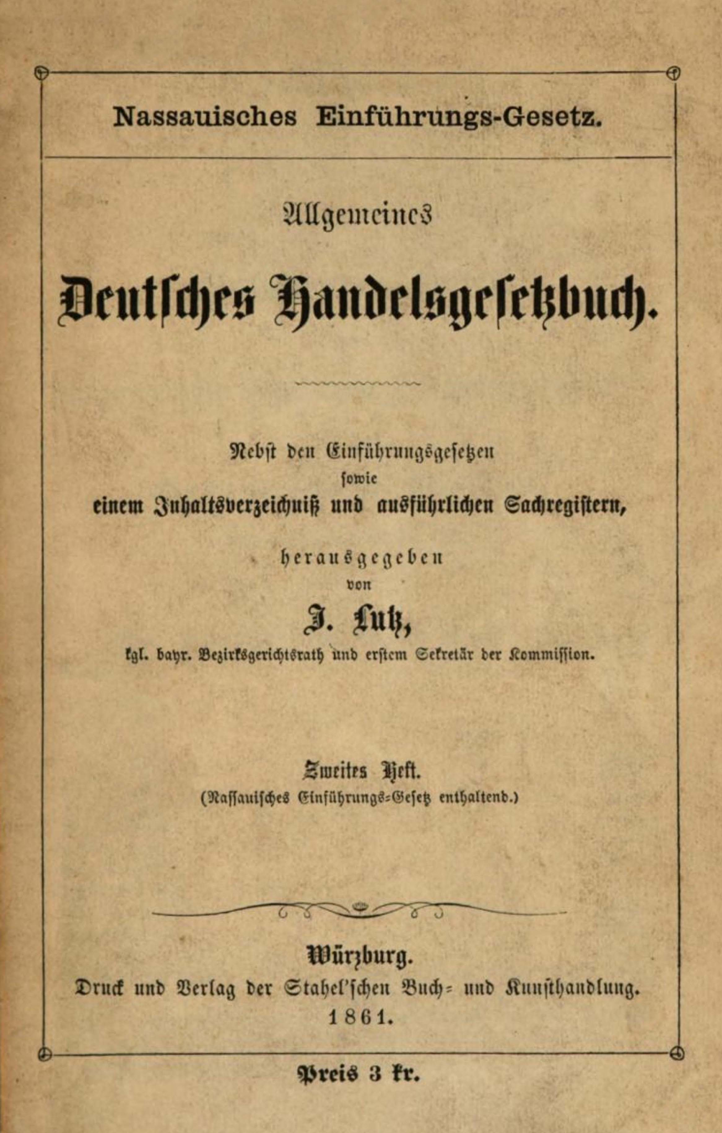 Титульный лист Германского торгового уложения.